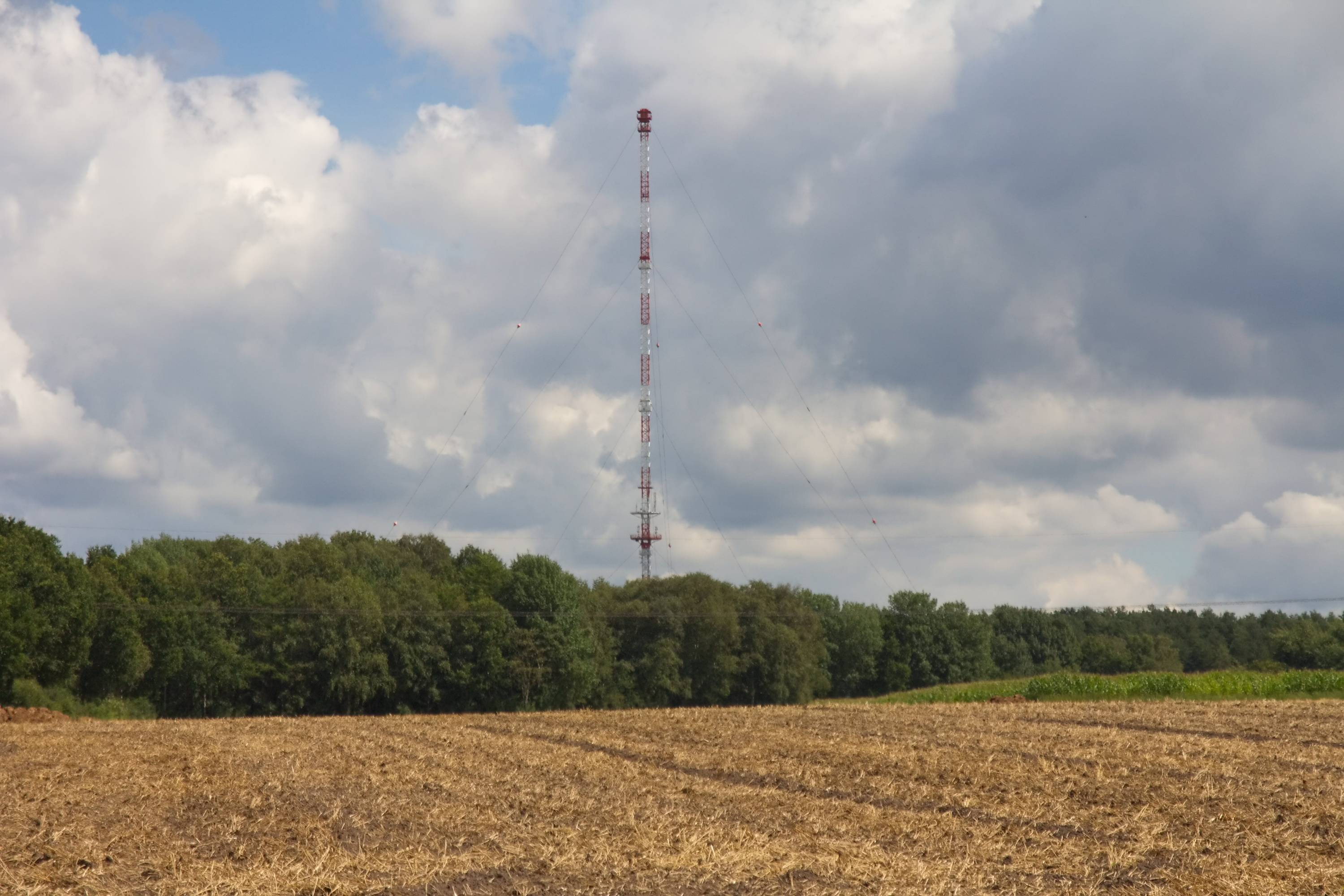 Sender Verden in Kirchlinteln, Niedersachsen, Deutschland.